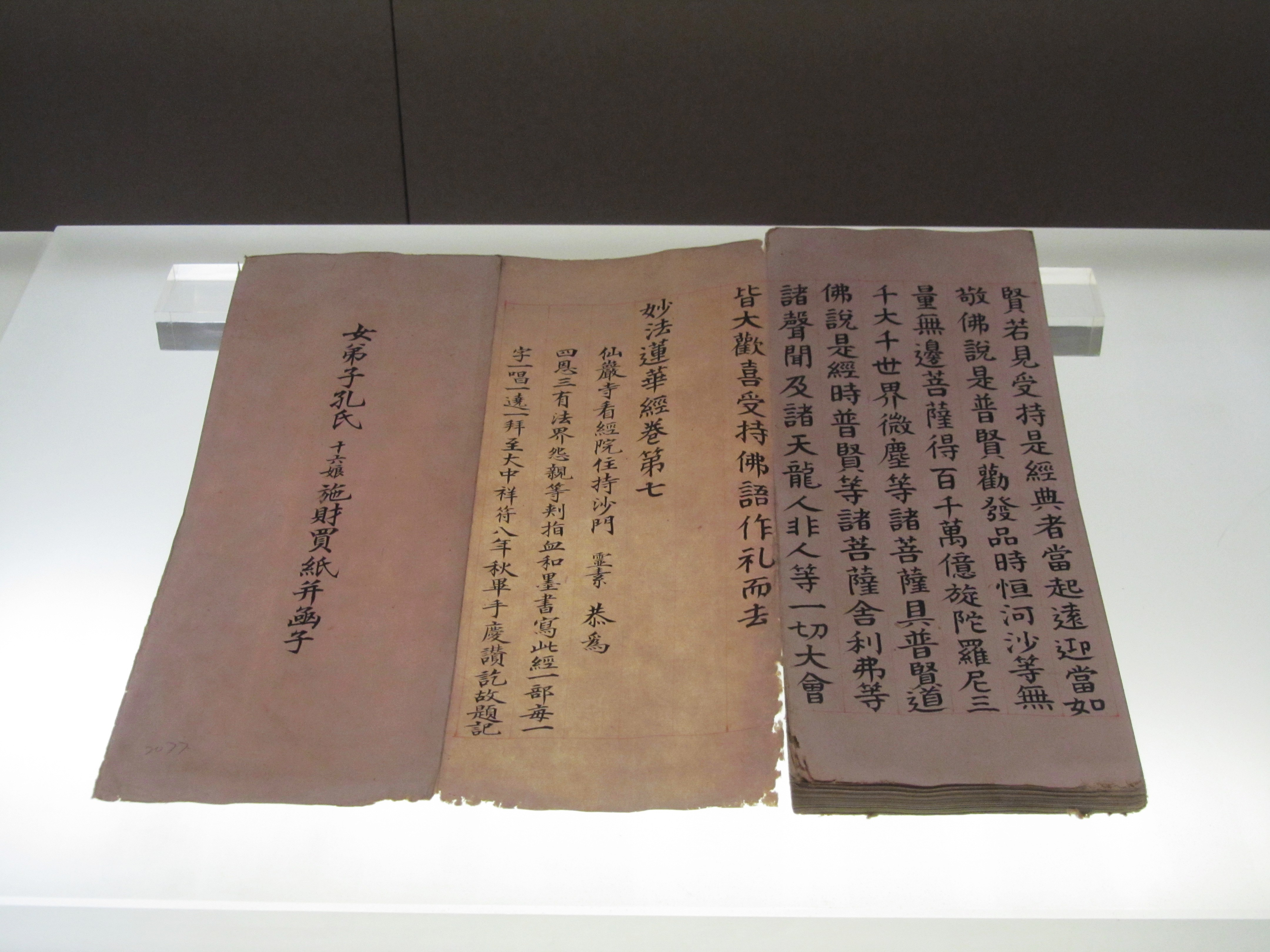 北宋寫本《大方广佛华严经入不思议解脱境界普贤行愿品》，瑞安慧光塔出土，現藏於浙江博物館。